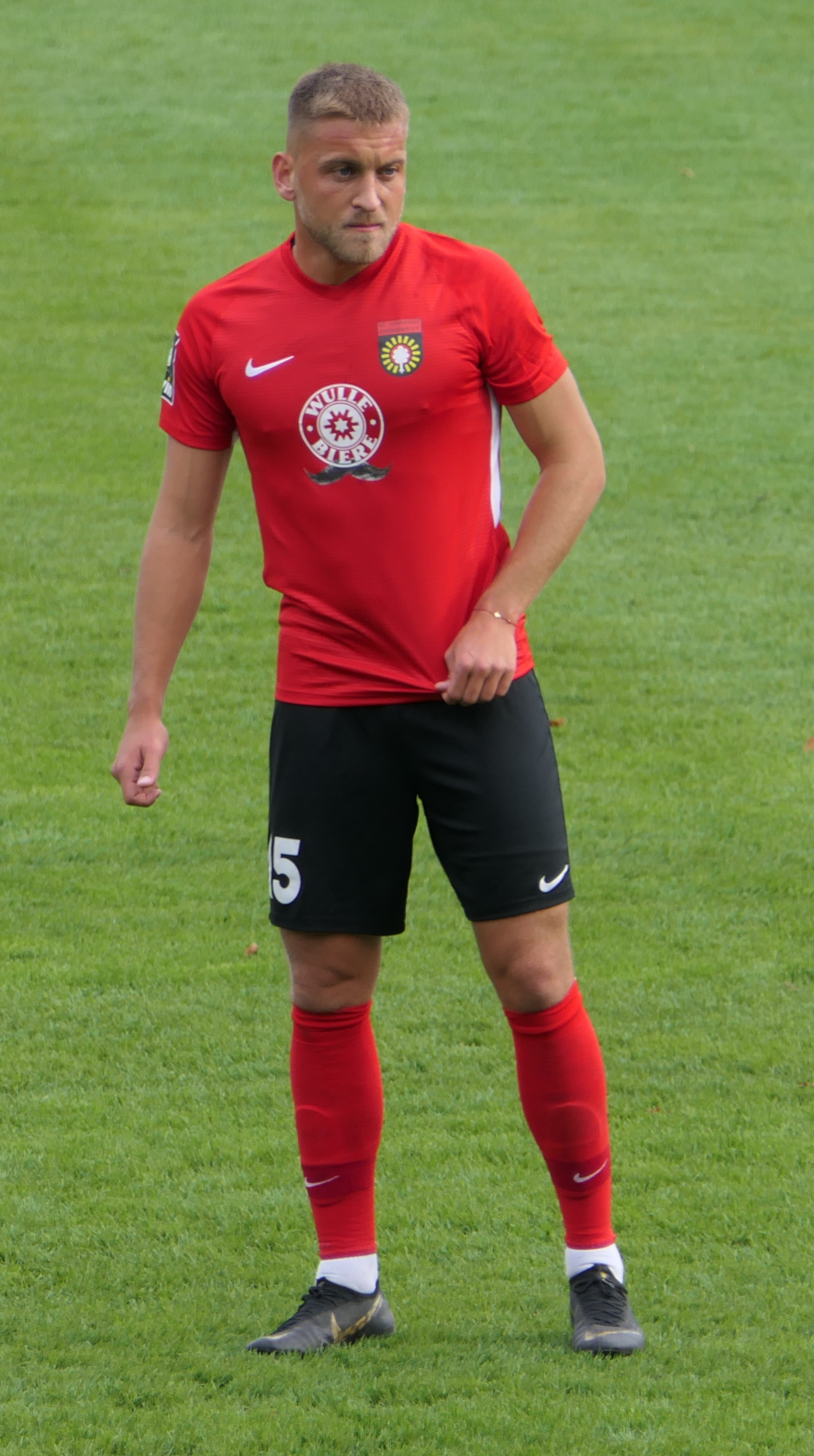 Der Fussballprofi Dennis Slamar im Trikot der SG Sonnenhof Großaspach beim Heimspiel gegen Eintracht Braunschweig am 27.10.2019.